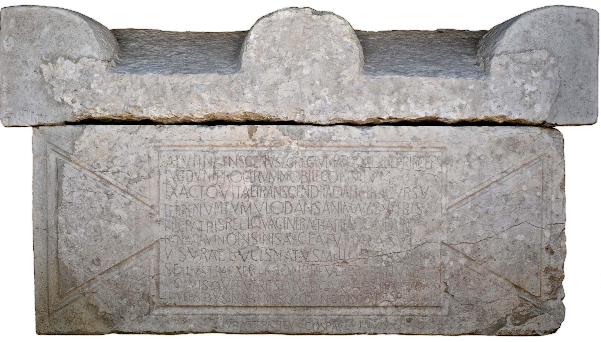 Sarcophage du sénateur Alethius (VIe s.) à Charmes-sur-Rhône. CIL XII, 2660